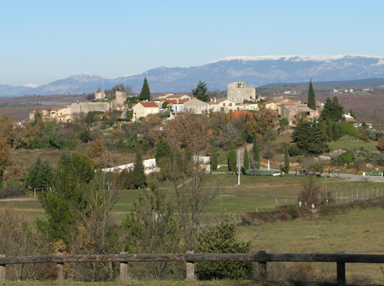 Vue générale côté sud-ouest du village de Montmeyan, Var, France.